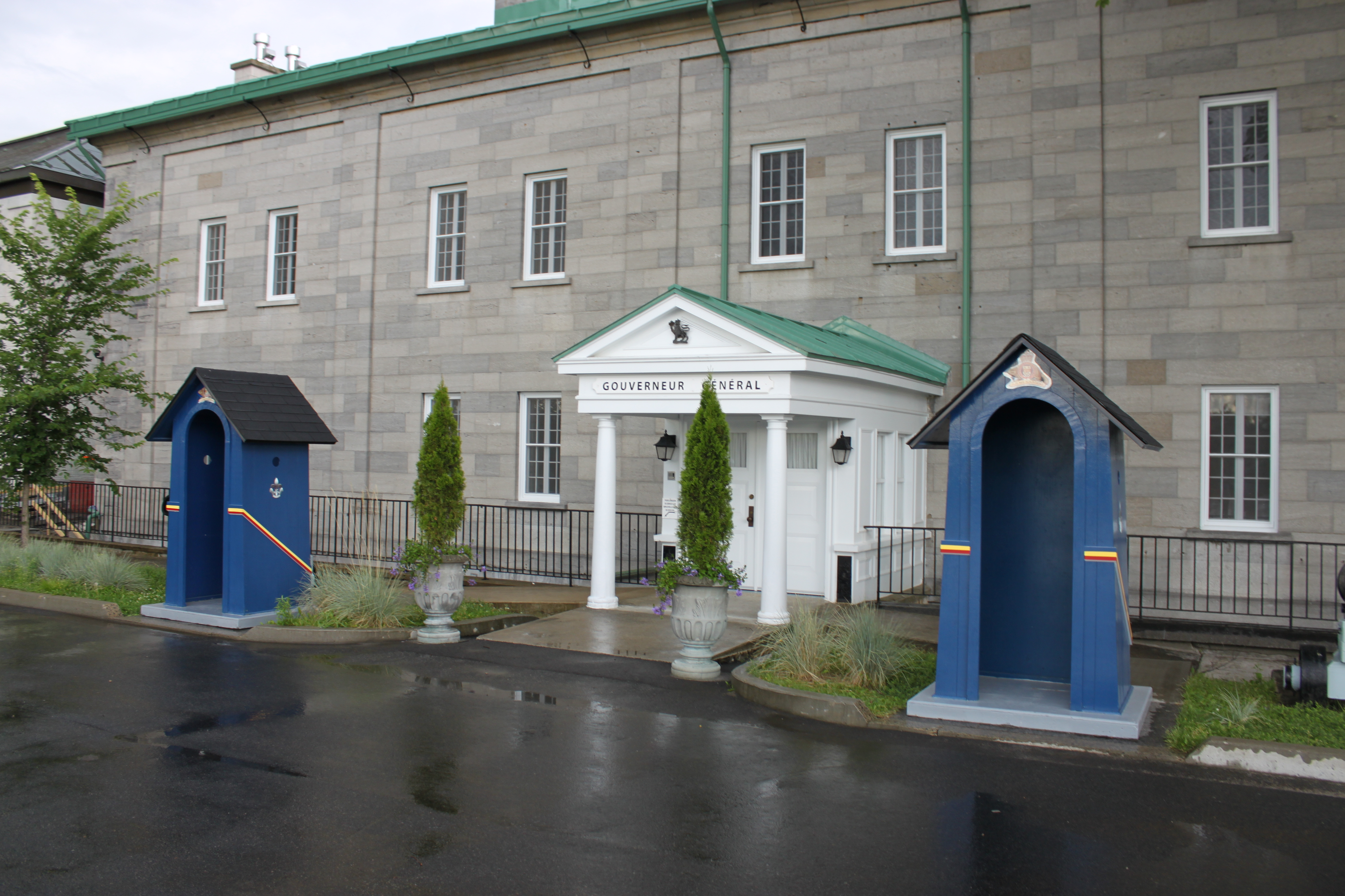 Der Nebensitz des Generalgouverneurs von Kanada in Québec